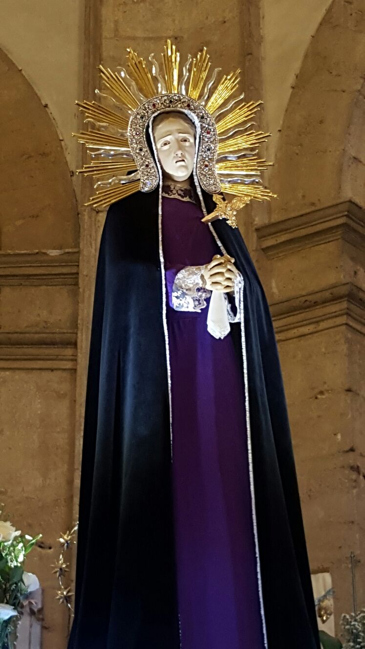 Il simulacro di Maria SS. Addolorata ai Cassari, è un opera dello scultore Girolamo Bangasco, lo stesso scultore che fù chiamato a realizzare il simulacro, opera un'innovazione per l'epoca, di solito le statue raffiguranti l'Addolorata venivano rappresentate in ginocchio, e le uniche parti trattate con maggiore cura erano le sole parti visibili, cioè (testa,collo, mani e piedi). allora lo scultore Bagnsco decise che per quest'opera voleva realizzare qualcosa di diverso dalle altre statue, infatti creò per la prima volta una statua raffigurante Maria Addolorata in piedi e interamente scolpita in tutte le sue parti come una vera donna.